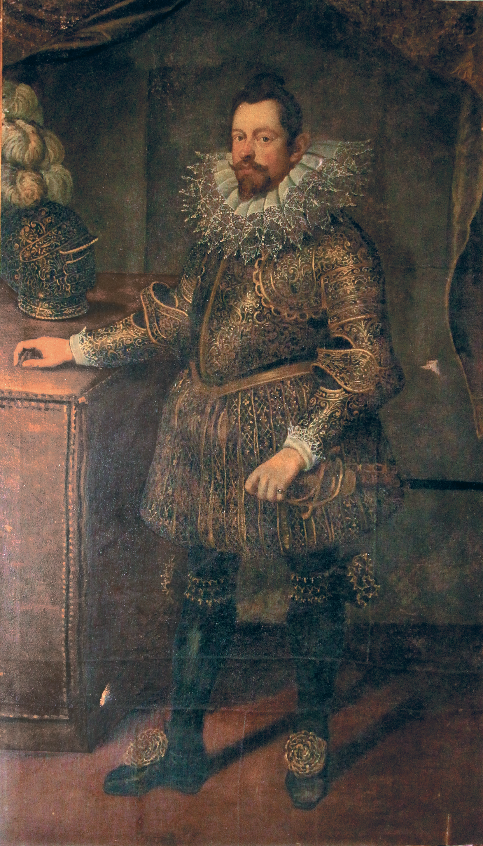 Vincenzo I Gonzaga con l’armatura del «SIC»